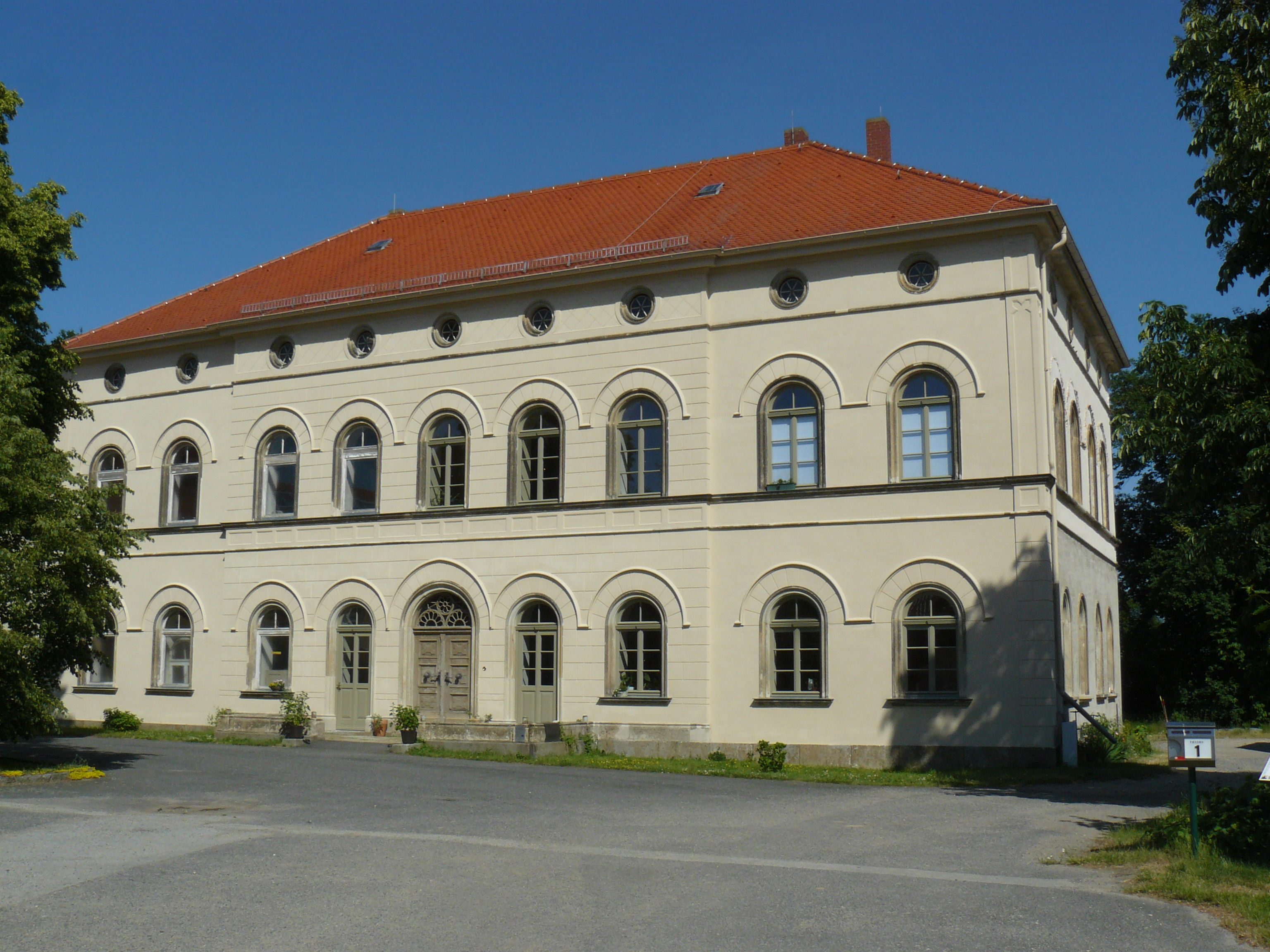 Herrenhaus Saritsch Hornjoserbsce: Knježi dom w Zarěču